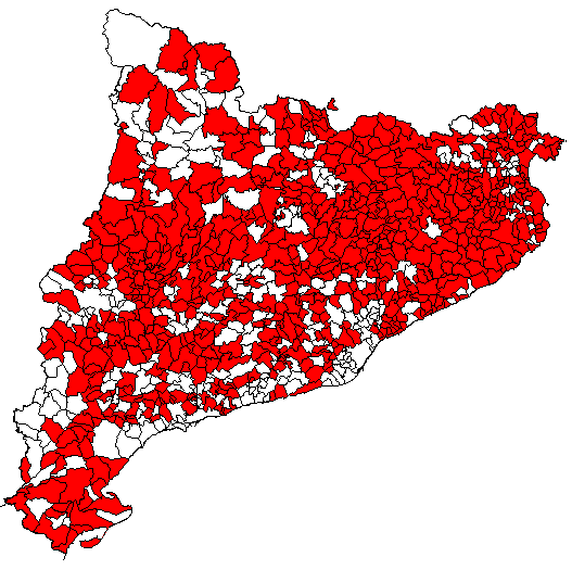 Mapa municipal del Principat de Catalunya on figuren en vermell els municipis adherits a l'AMI.